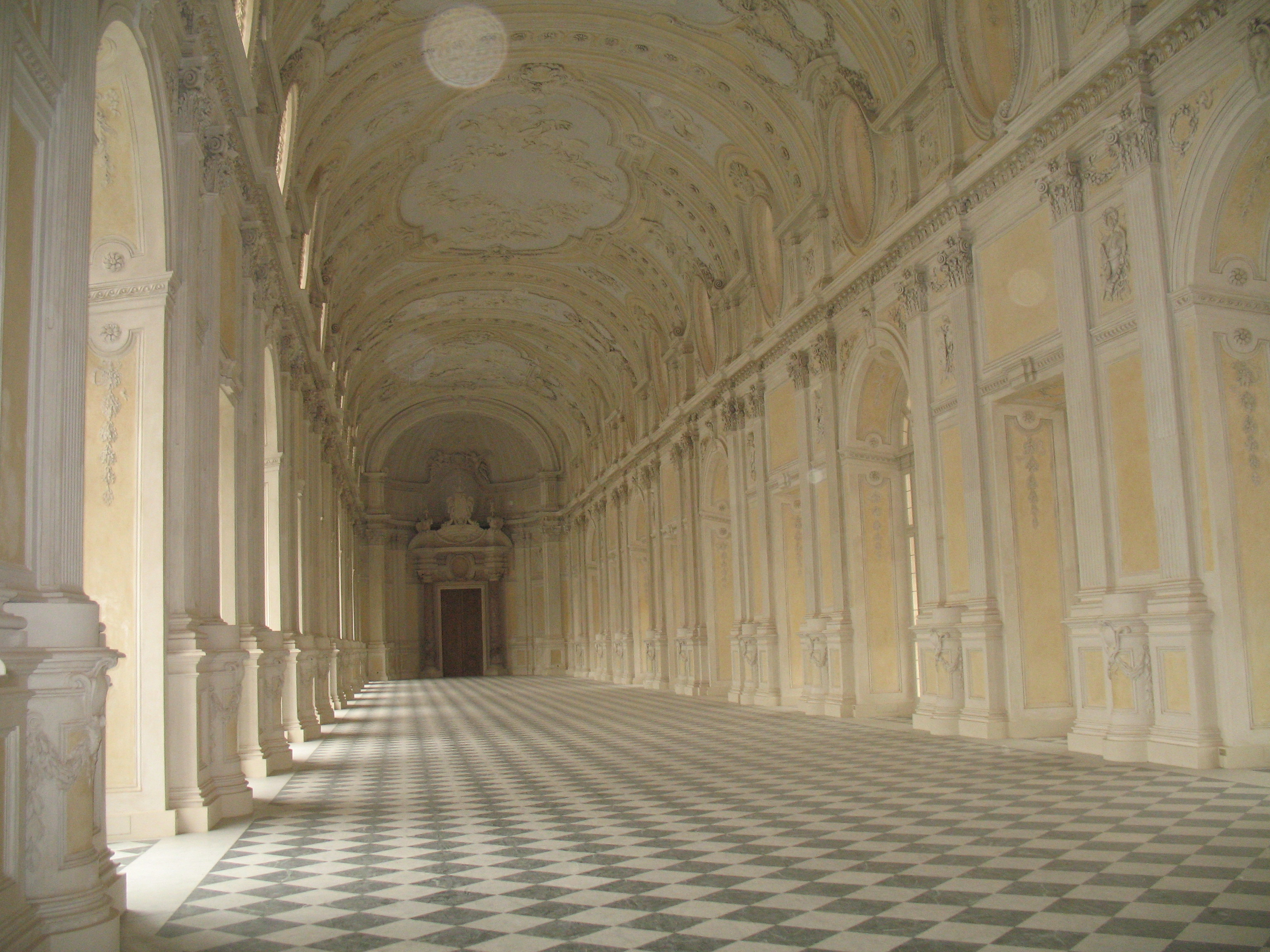 Reggia di Venaria Reale, Torino - interni